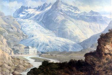 Hotel Glacier du Rhône in Gletsch mit Rhonegletscher